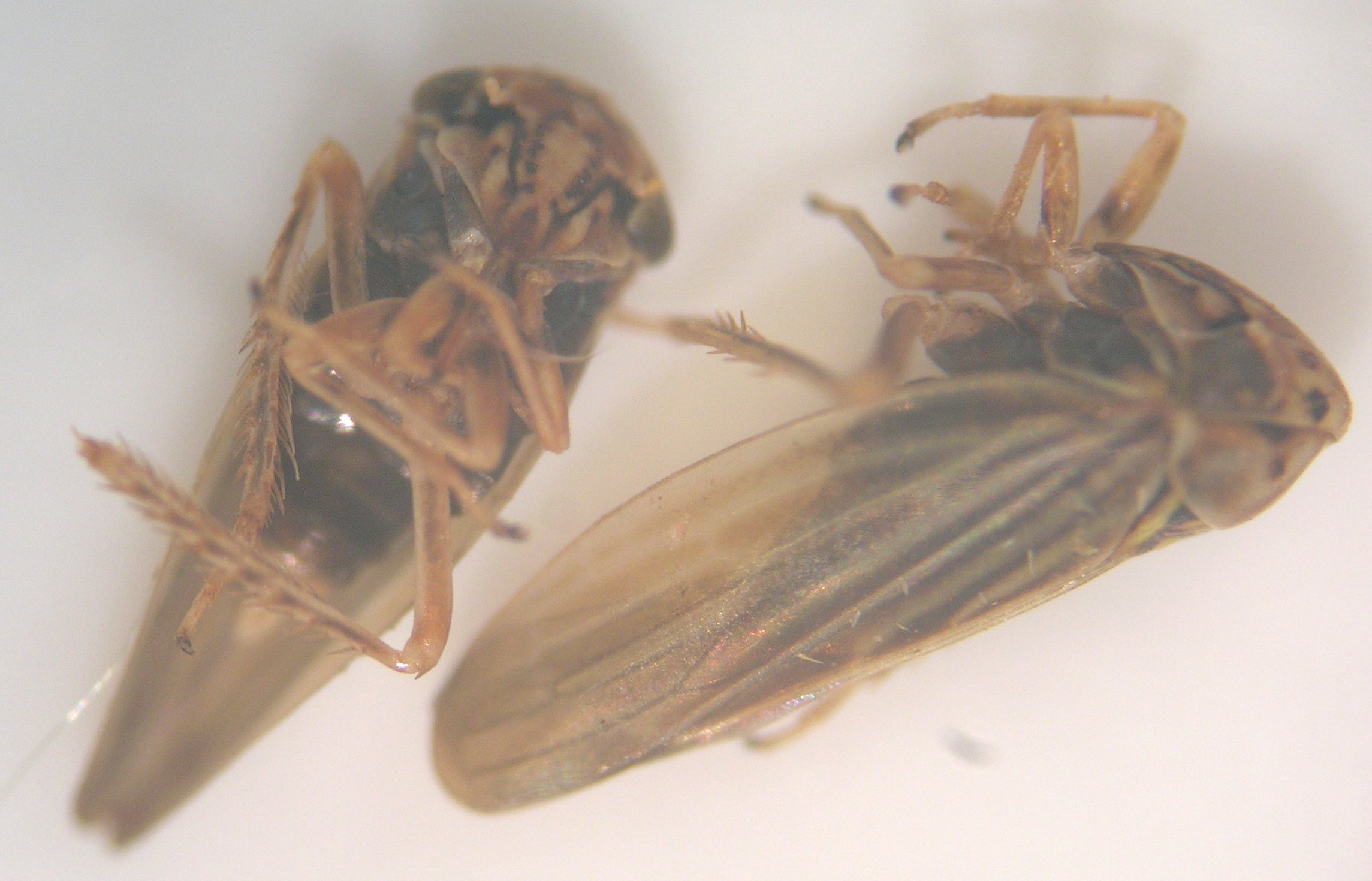 Agallia lingula from Hawai'i.